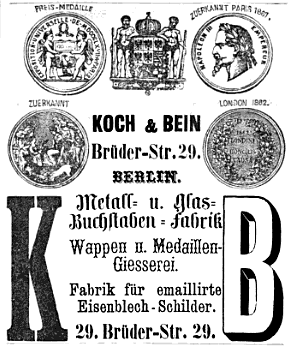 Werbeanzeige von Koch und Bein in der Deutschen Bauzeitung